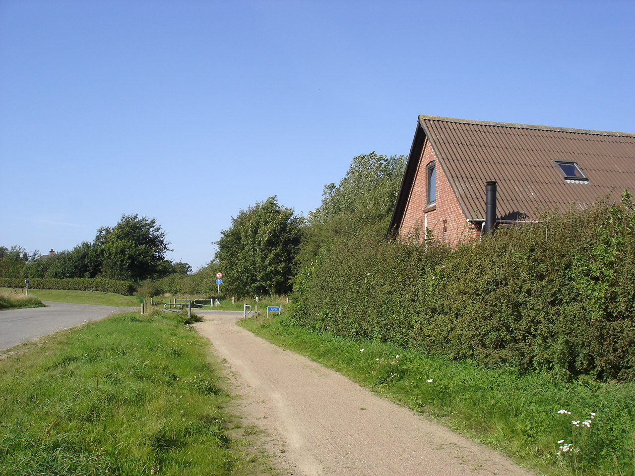 Salling Natursti krydser Intrupvej S for Lyby